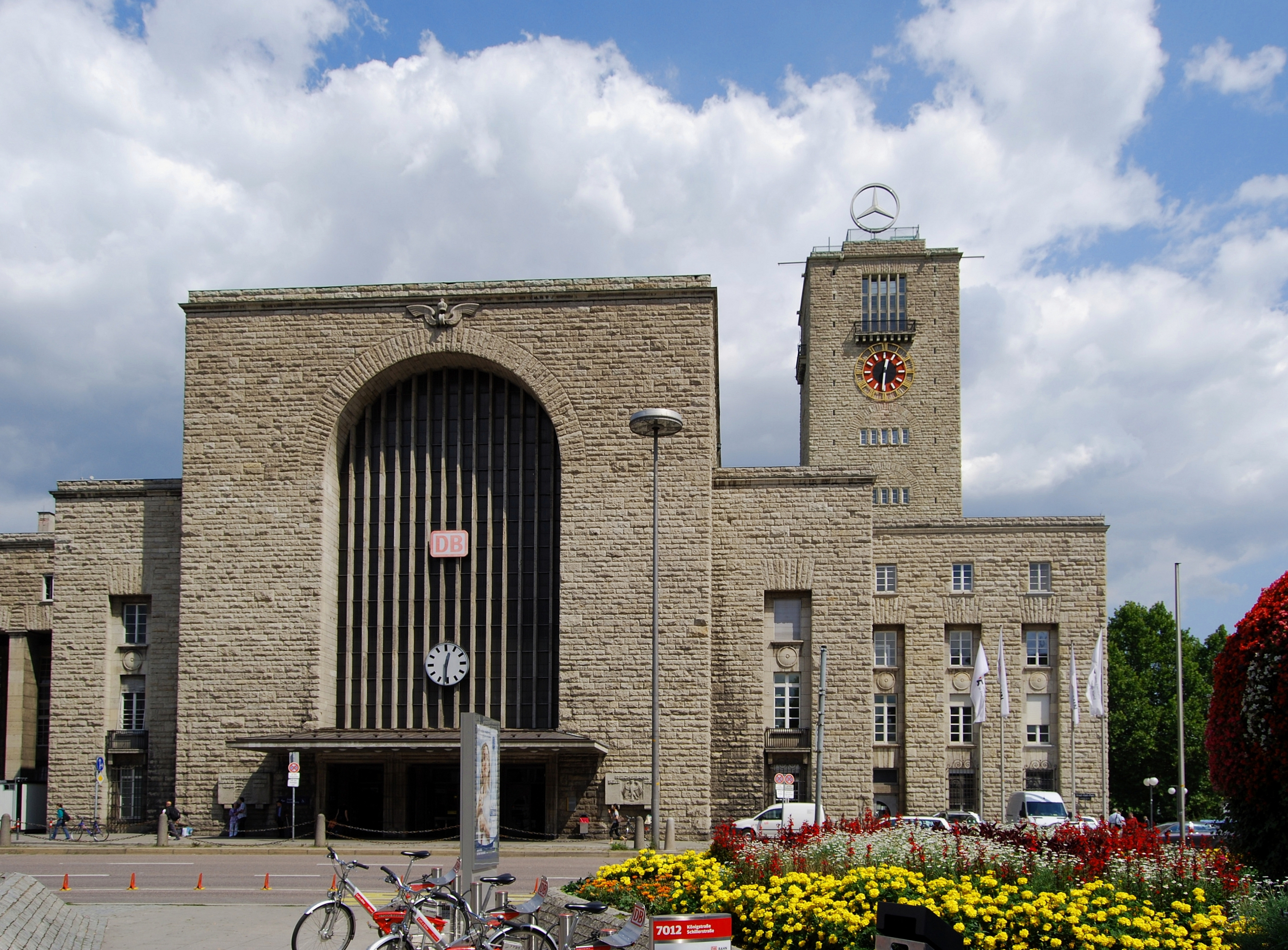 Stuttgarter Hauptbahnhof, Bahnhofsturm